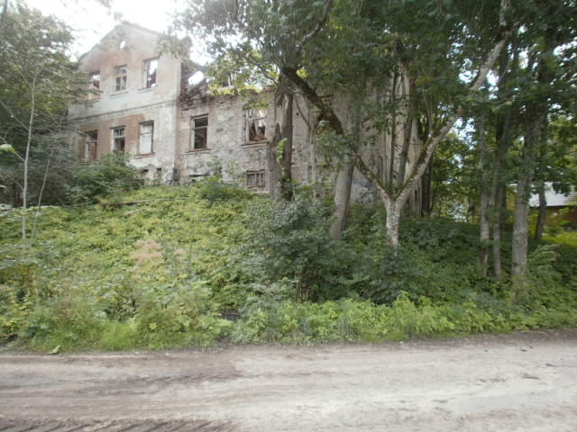 Lagunenud mõisahoone kirdest vaadatuna.